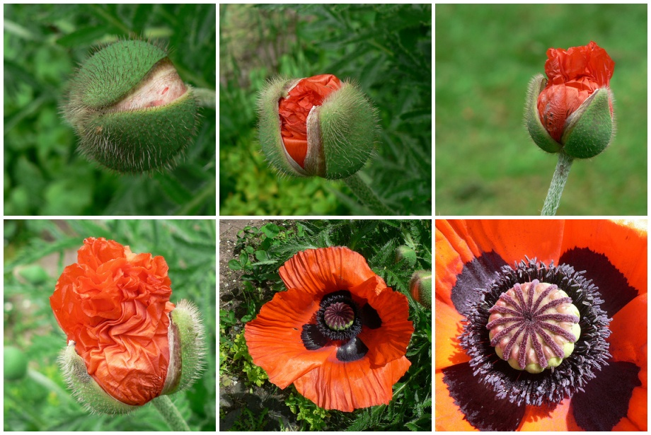 Phases de floraison du Pavot d'Orient